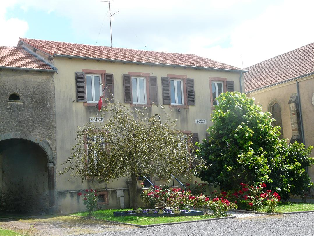 Commune de Lindre-Basse. Mairie-Ecole